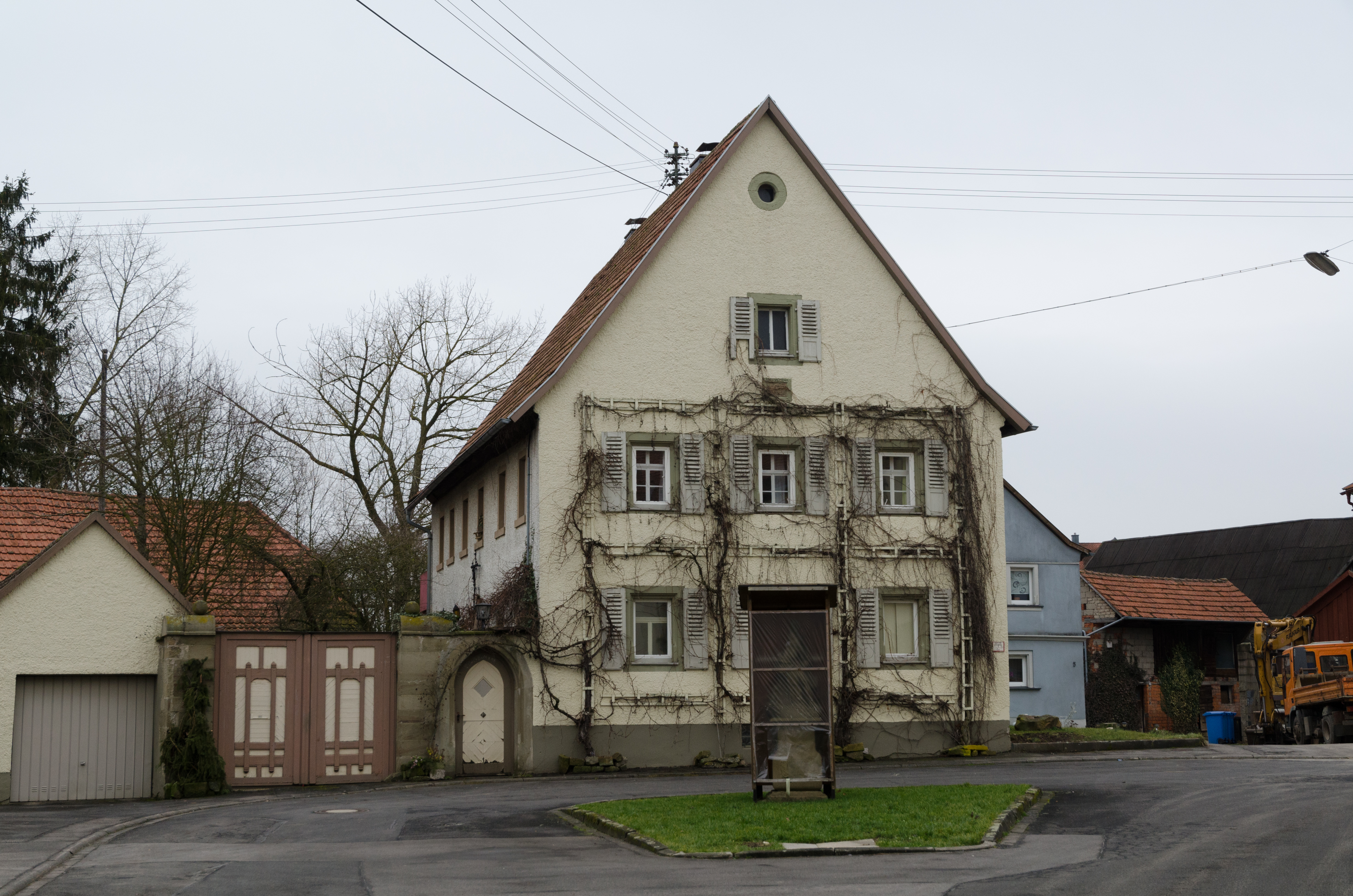 Münnerstadt, Seubringshausen, Sankt-Kilians-Platz 4